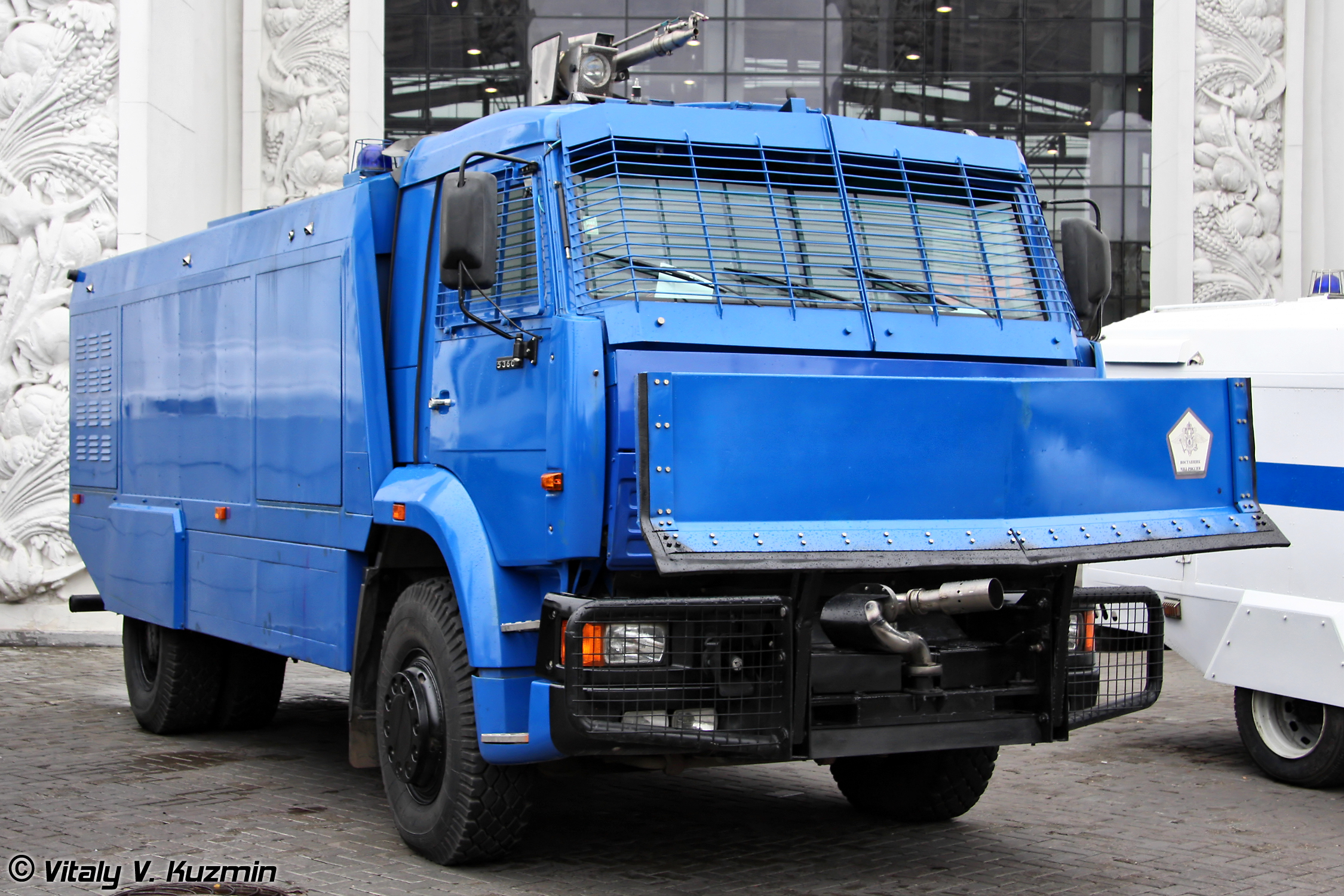 Водометный автомобиль Шторм на базе КАМАЗ-53605 (Anti-riot vehicle Shtorm on KAMAZ-53605 chassis)